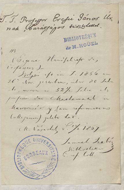 Lettre de correspondance du 20/02/1867. Intégré à la bibliothèque de Jules Houël.